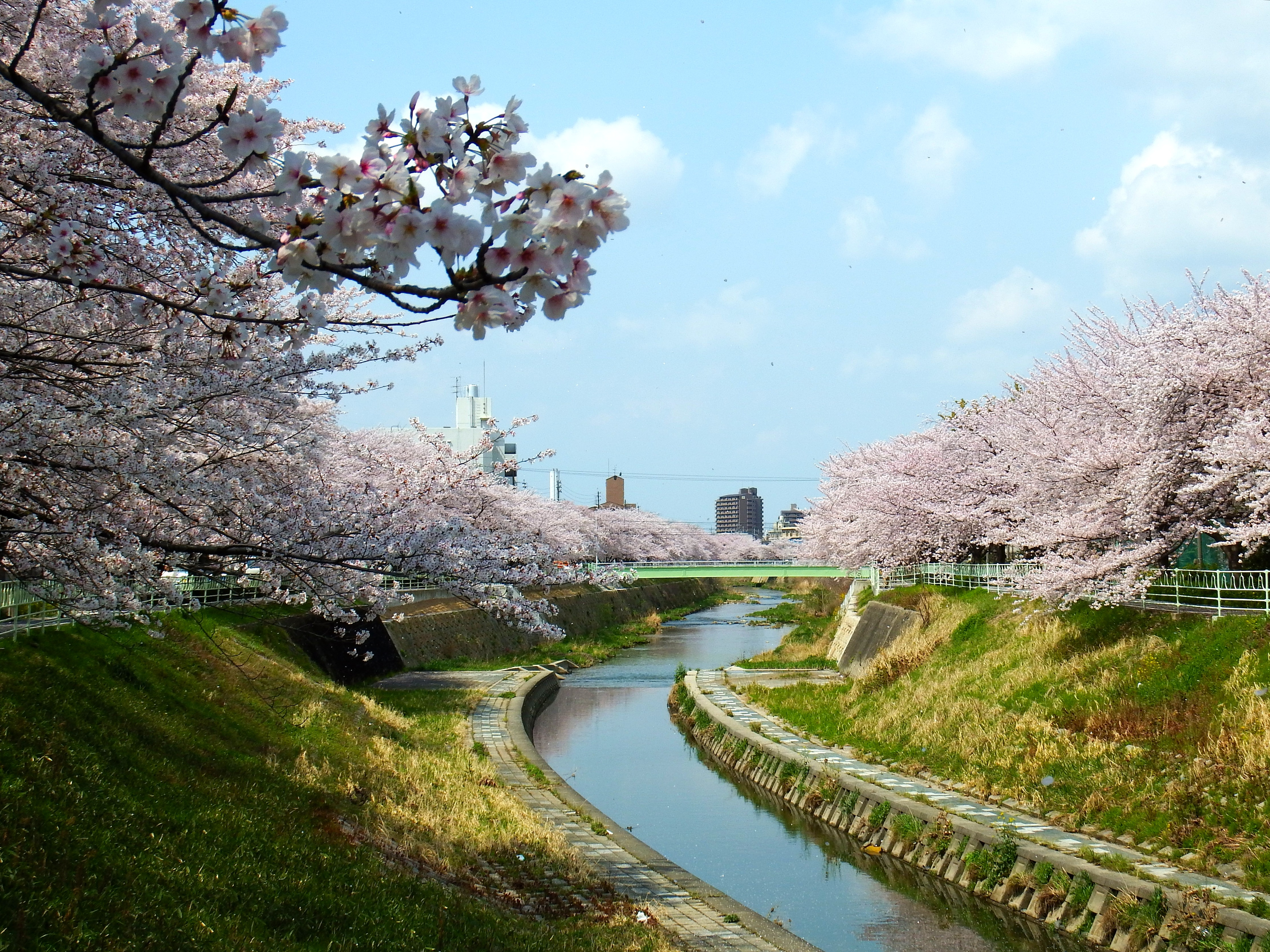 香流川１桜